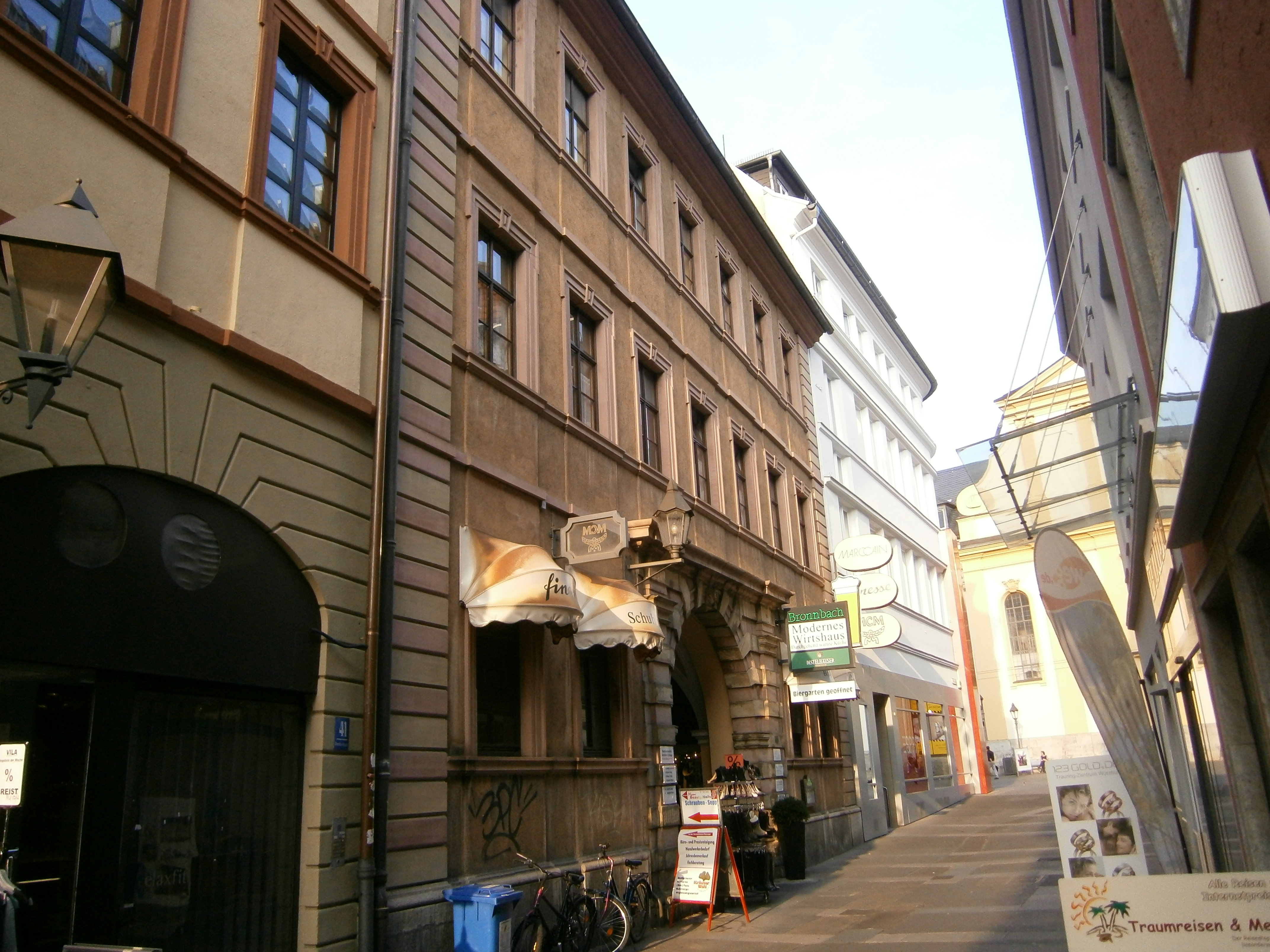 Würzburg - Bronnbacher Gasse 43 Ehem Hof Friedberg oder Kleinmaidbronn